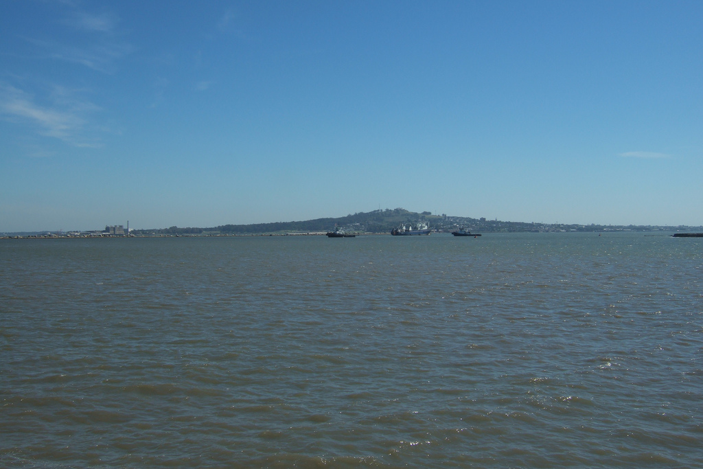 Vista panorámica de la costa rioplatense de Montevideo, Uruguay. En el fondo puede apreciarse la costa y el cerro que da nombre a la ciudad.